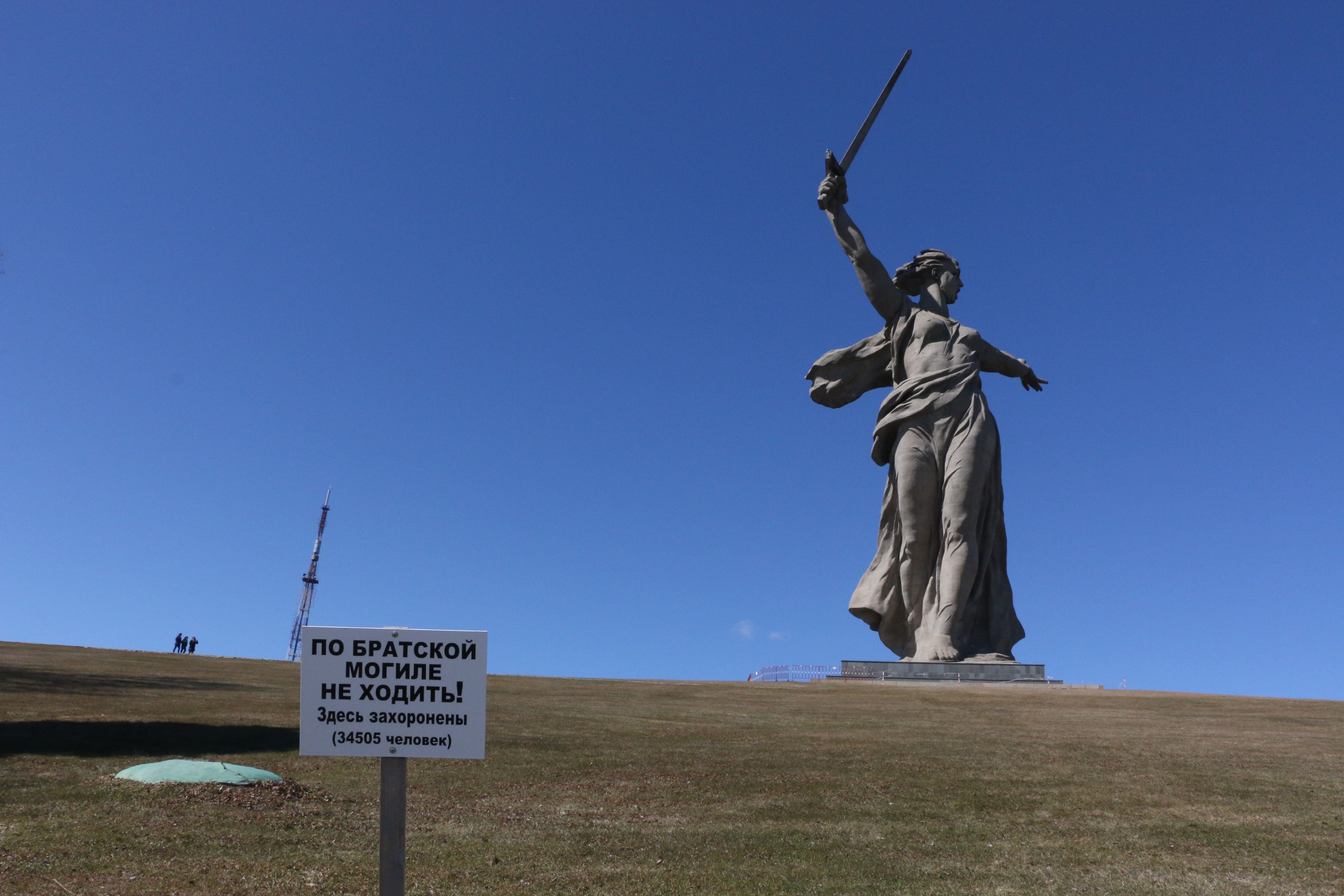 По Братской могиле не ходить, Мамаев курган